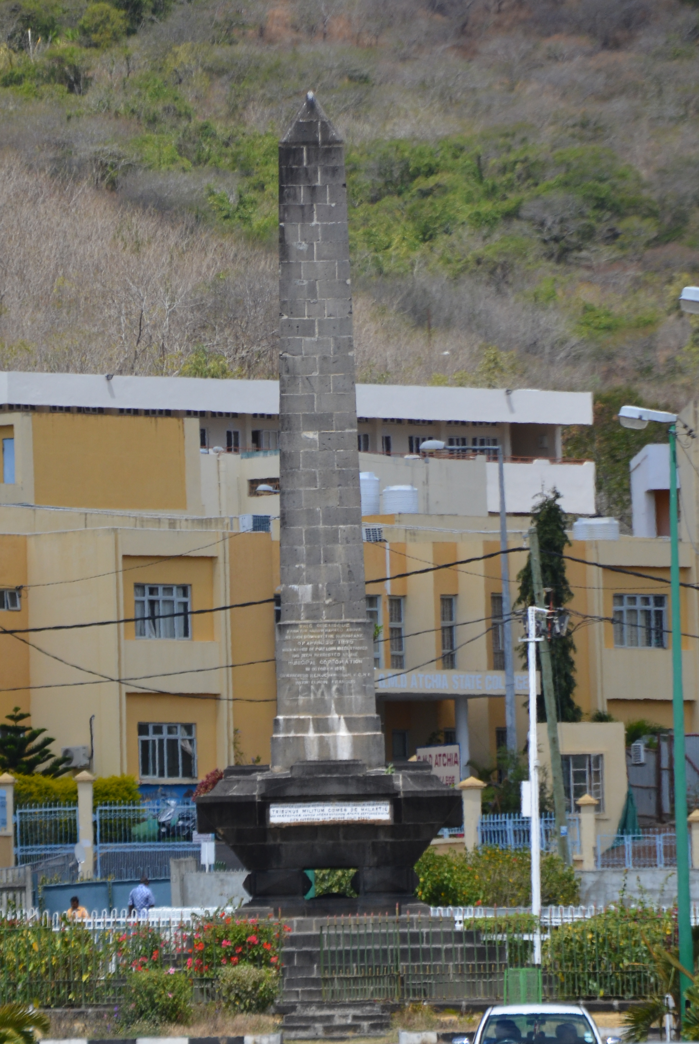 Port Louis, Malartic Tomb